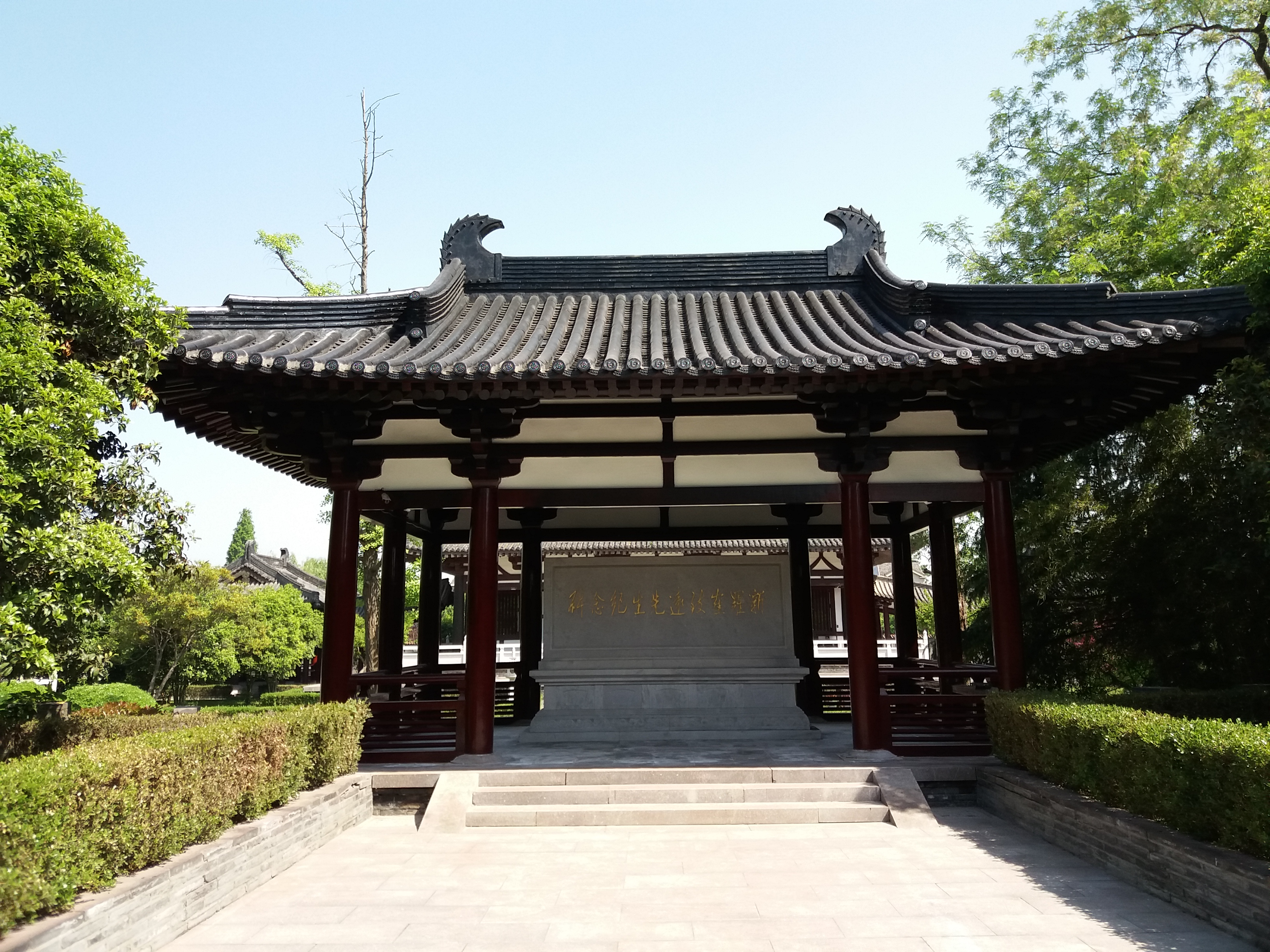 崔致远纪念馆园中的纪念碑亭